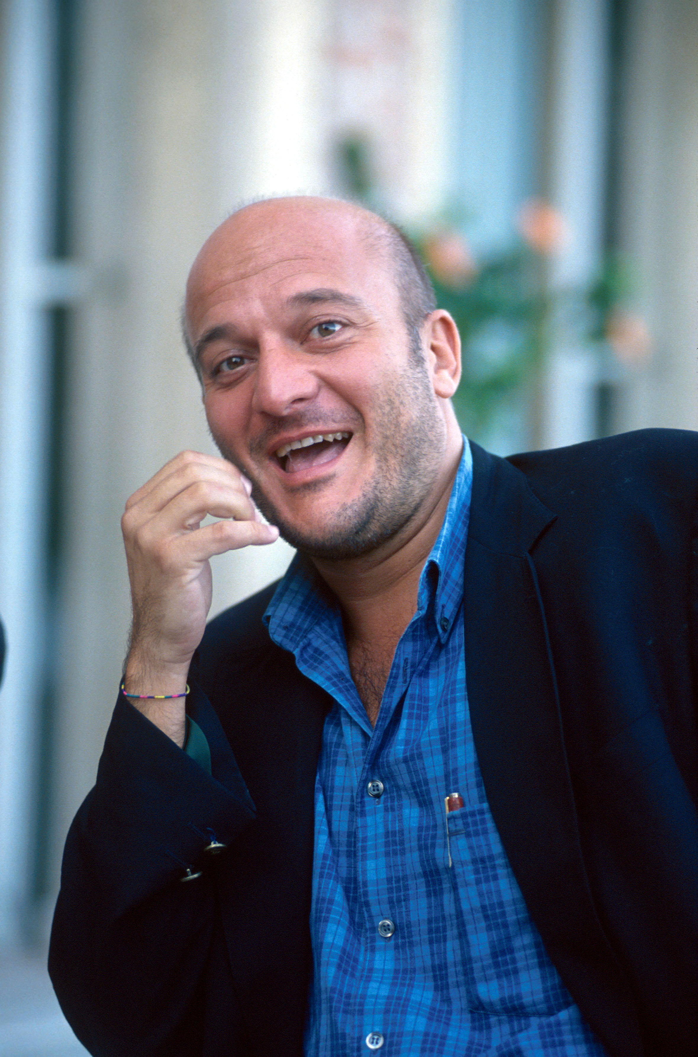 Claudio Bisio alla Mostra del cinema di Venezia del 1991